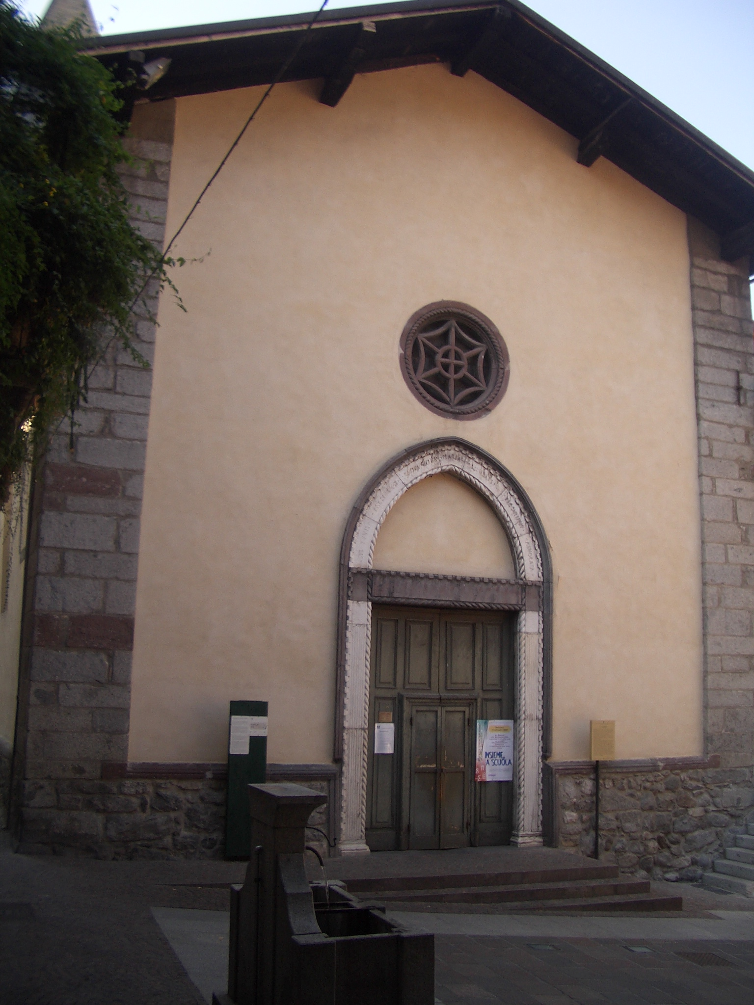 Santa Maria degli Orti Church, Bienno, Brescia, Italy